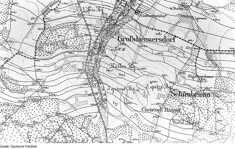 Original image description from the Deutsche Fotothek Großhennersdorf. Meßtischblatt, Sekt. Löbau, 1884